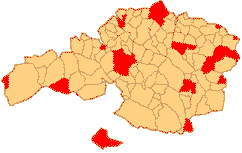 Bizkaiko hiri eta hiribilduen kokapena.